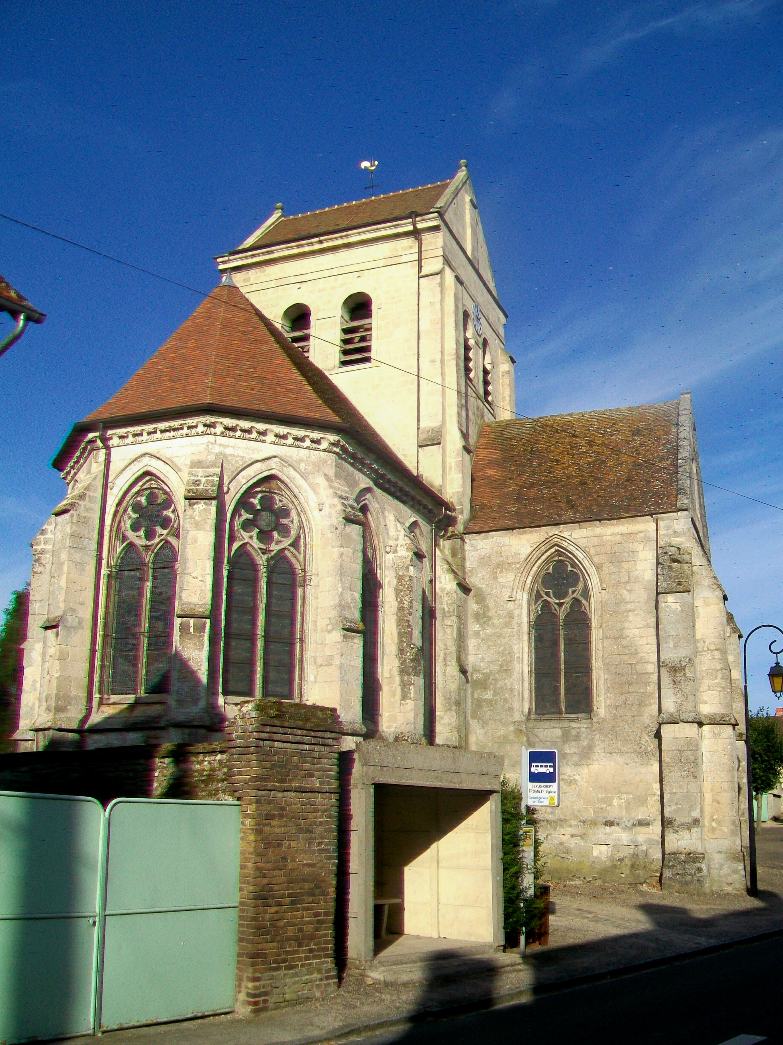 Vue d'ensemble depuis le nord-est.